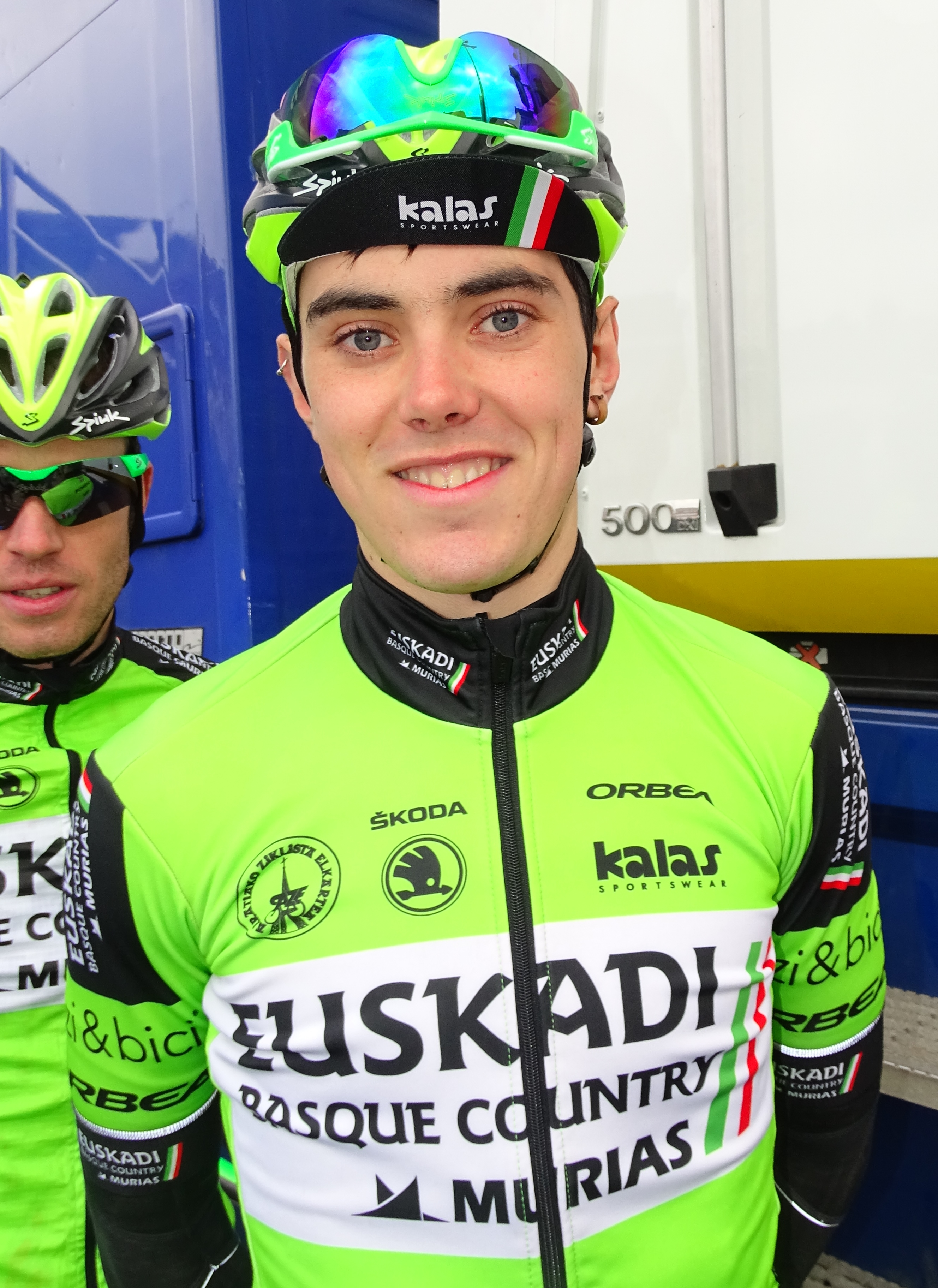 Reportage réalisé le dimanche 6 mars à l'occasion du départ et de l'arrivée du Grand Prix de Lillers-Souvenir Bruno Comini 2016 à Lillers, Pas-de-Calais, Nord-Pas-de-Calais, France.